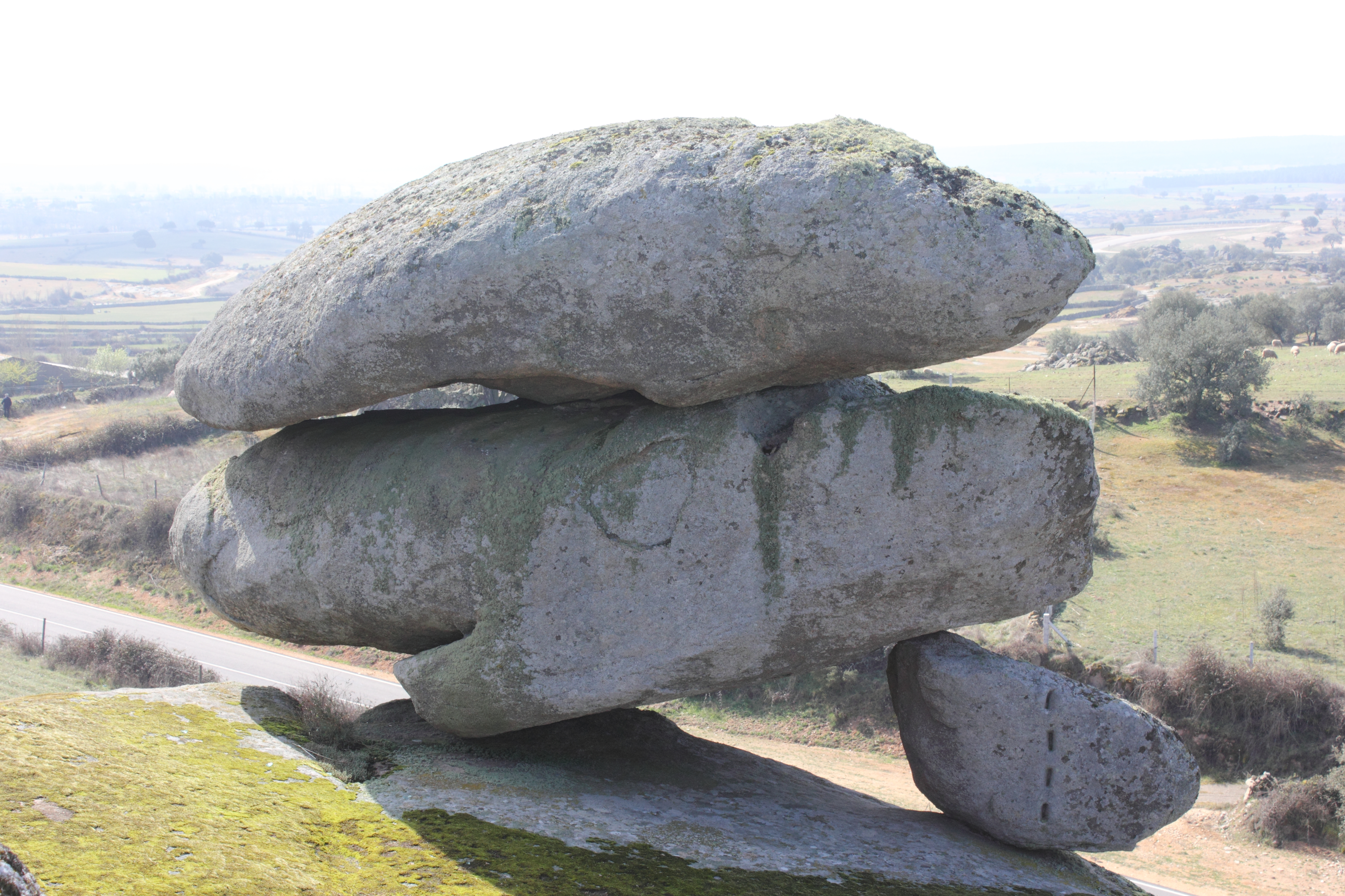 Peña de Peñausende